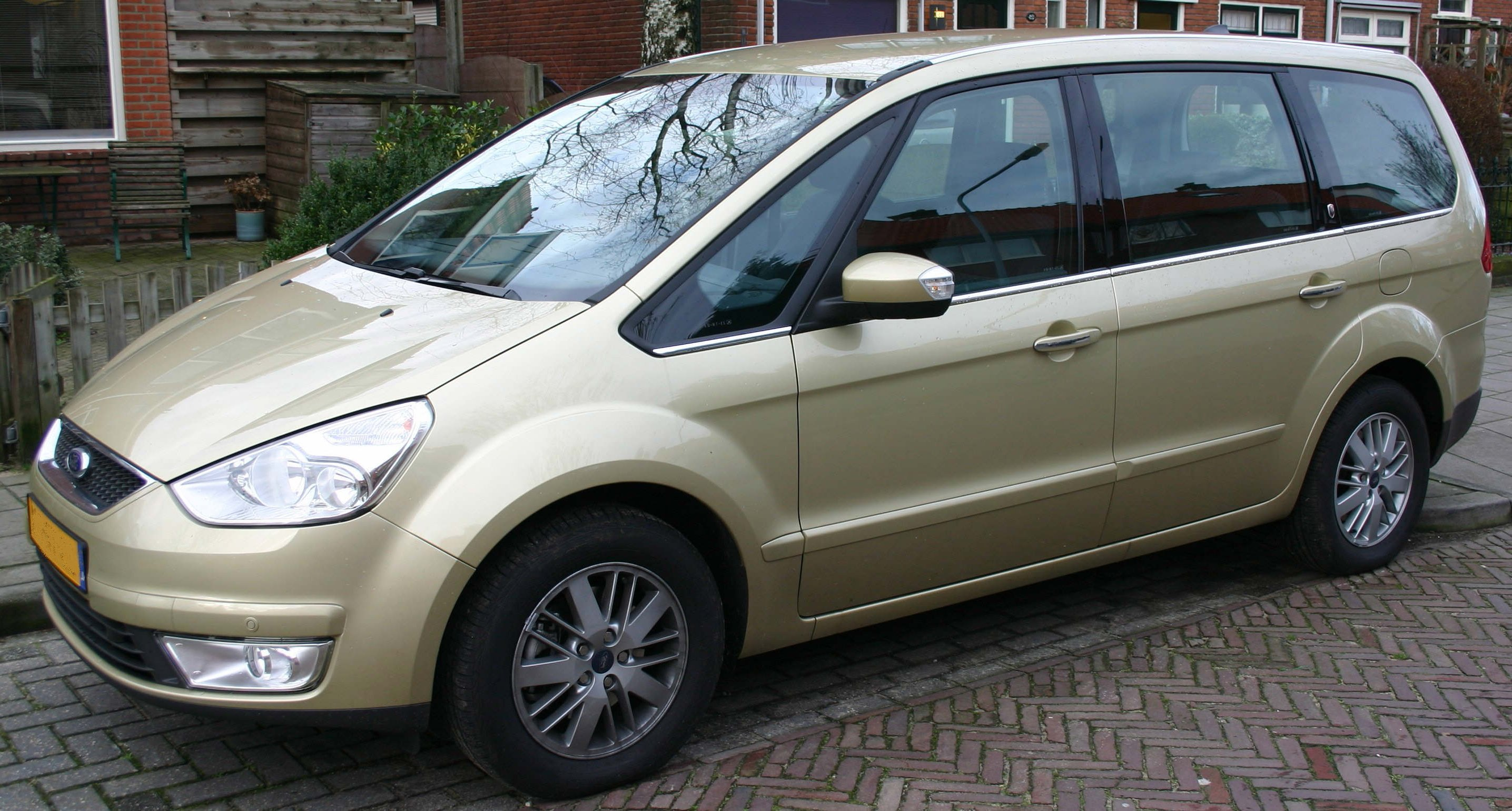 Ford Galaxy model 2007